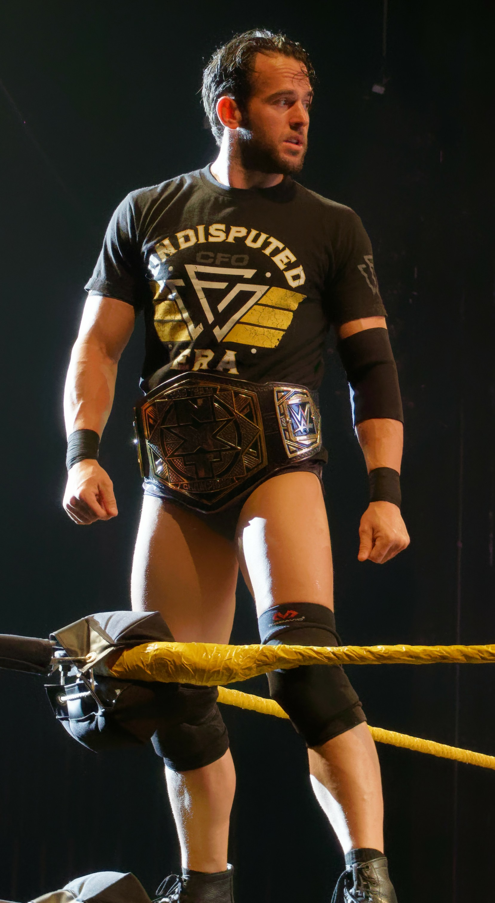 WWE Live 2018 - Antwerpen (NxT) - Kyle O'Reilly&Roderick Strong Vs Danny Burch&Oney LorcanKyle O'Reilly (c)&Roderick Strong (c) def. (Pin) Danny Burch&Oney LorcanFor : NXT Tag Team Titles (No Title Change)( Bonne nouvelle pour les inconditionnels du catch en Belgique : le mardi 12 juin 2018, les superstars de NXT donneront le meilleur d'eux-memes au Stadsschouwburg Antwerpen, lors d'un show exclusif au Benelux.WWE NXT est une emission televisee creee en 2010, durant laquelle de jeunes catcheurs sont formes par des veterans comme Chris Jericho et C.M. Punk. Tous partagent le meme reve : devenir la nouvelle star du catch. Le programme WWE NXT a tres vite rencontre un enorme succes. Aujourd'hui, WWE NXT est connu comme une veritable machine a talents. Pensez par exemple a Seth Rollins, qui etait encore chez nous pas plus tard que l'annee derniere pour WWE Live.Cette annee encore, vous aurez la chance de voir a l'oeuvre de nombreux nouveaux talents du catch ! A l'affiche, on trouve notamment Aleister Black, Adam Cole, Undisputed Era, Velveteen Dream, Ricochet, Nikki Cross, Shayna Baszler et Kairi Sane. Le line-up reste sujet a des changements de derniere minute.Attendez-vous a un show sensationnel et plein de tension ! )